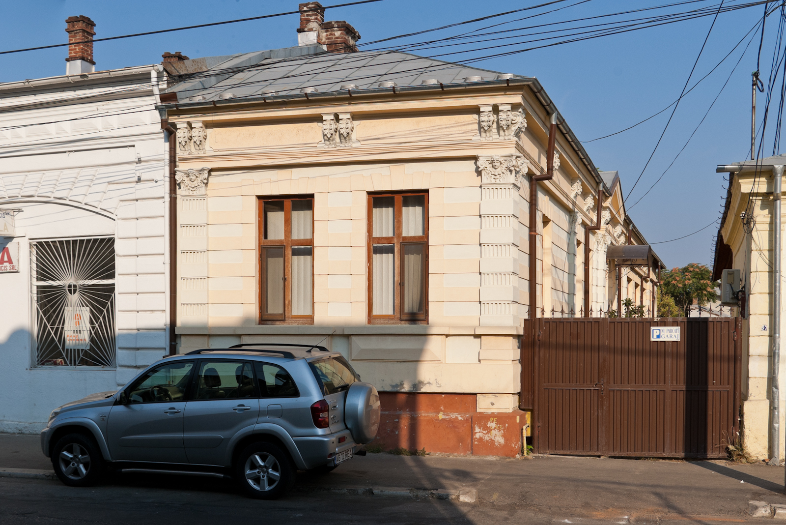 Fotografia prezinta casa cu atelier de tăbăcar, de pe str. Sfânta Vineri 27, vazuta dinspre E.